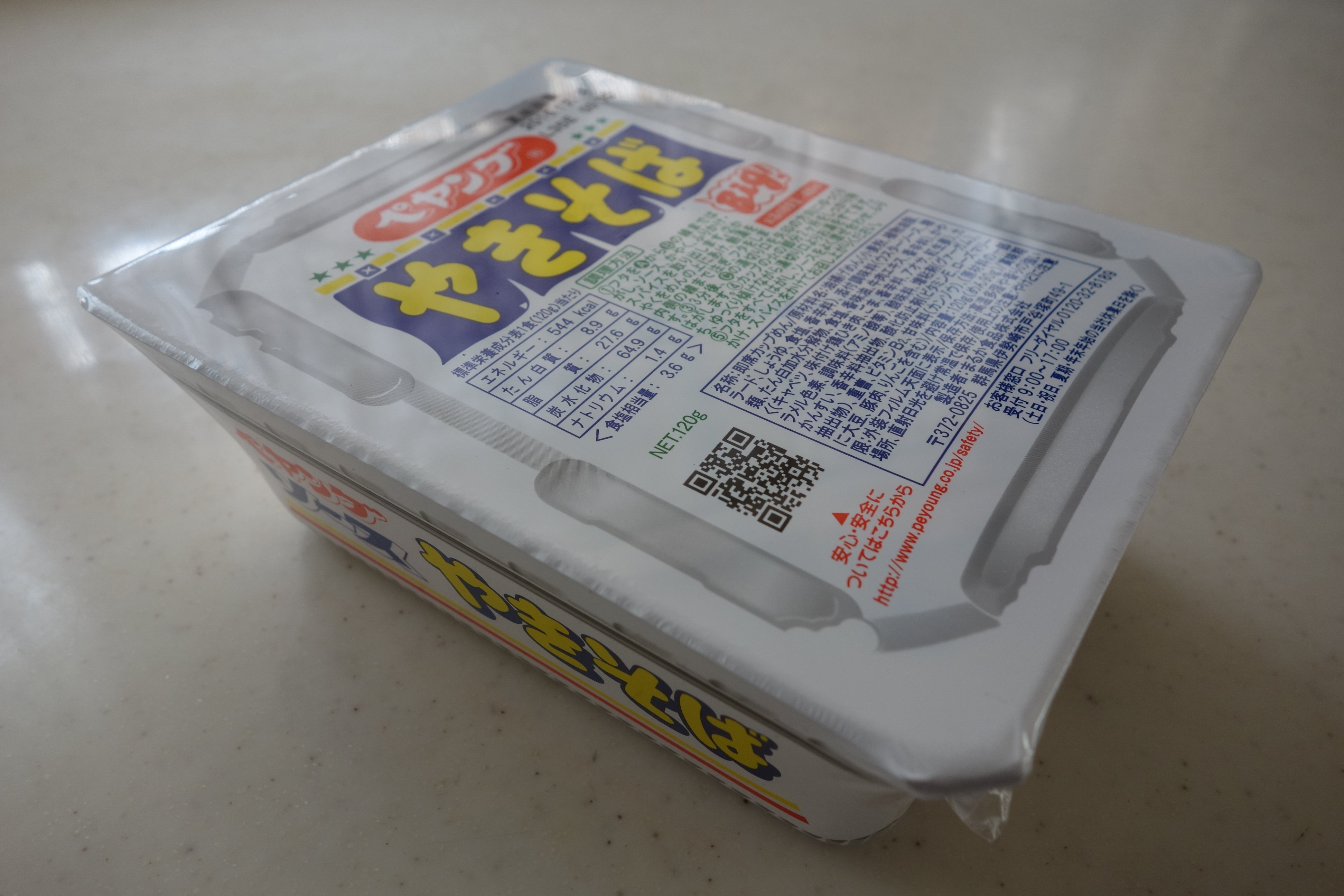 ペヤング新型パッケージ。2015年6月12日撮影。